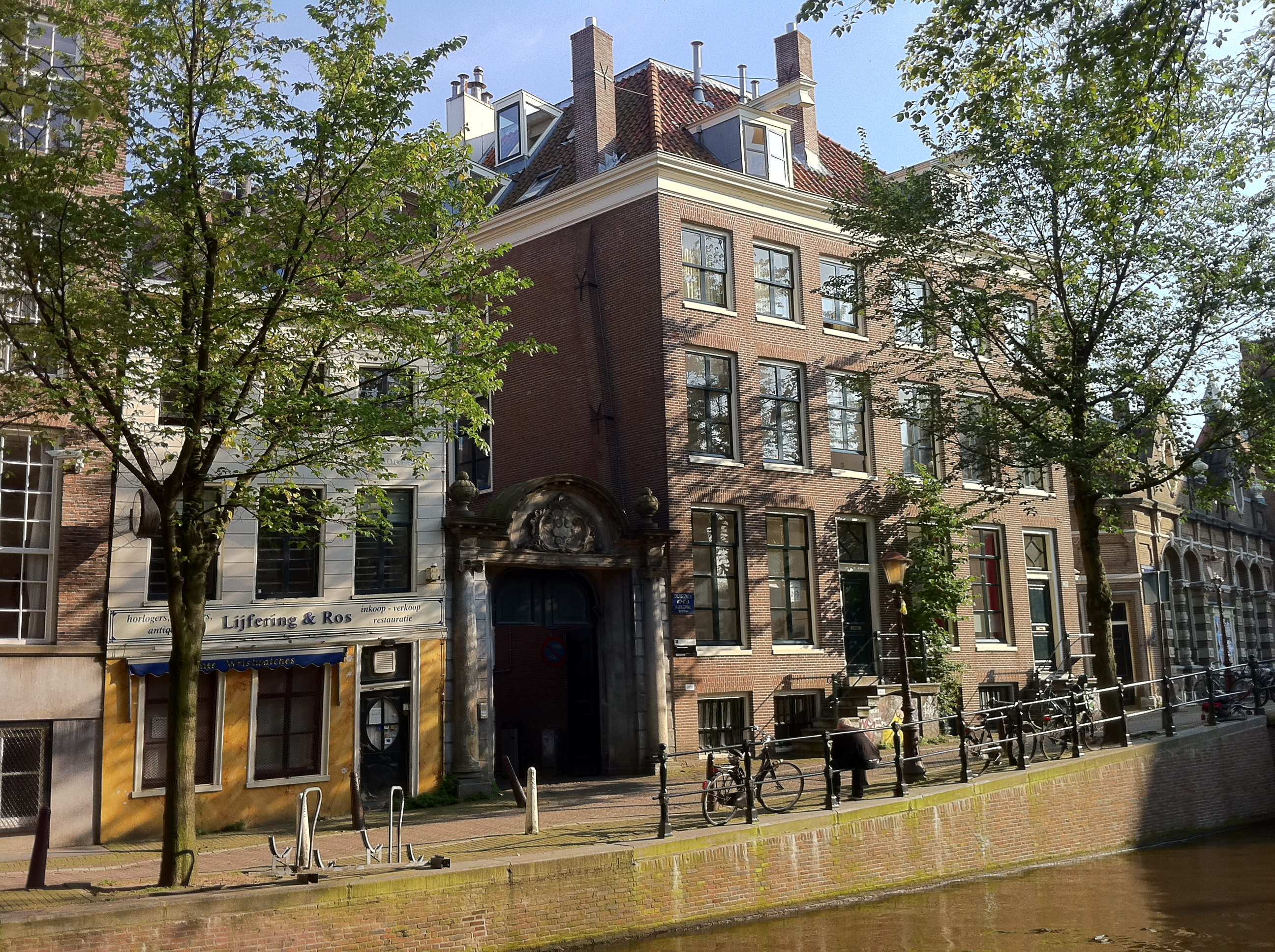 Huisje bij ingang Oudemanhuispoort